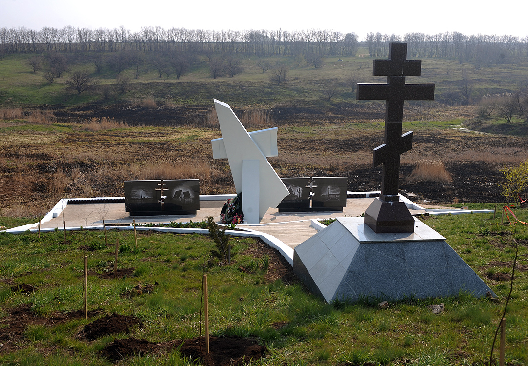 на месте катастрофы